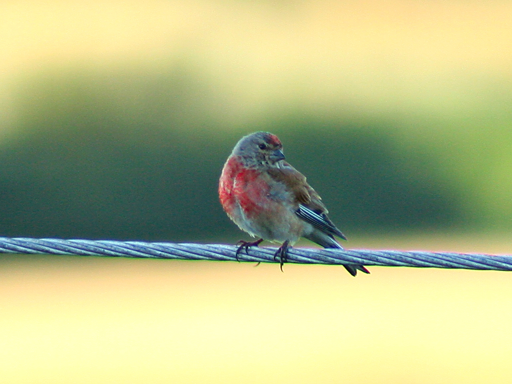 Carduelis cannabina, Linnet